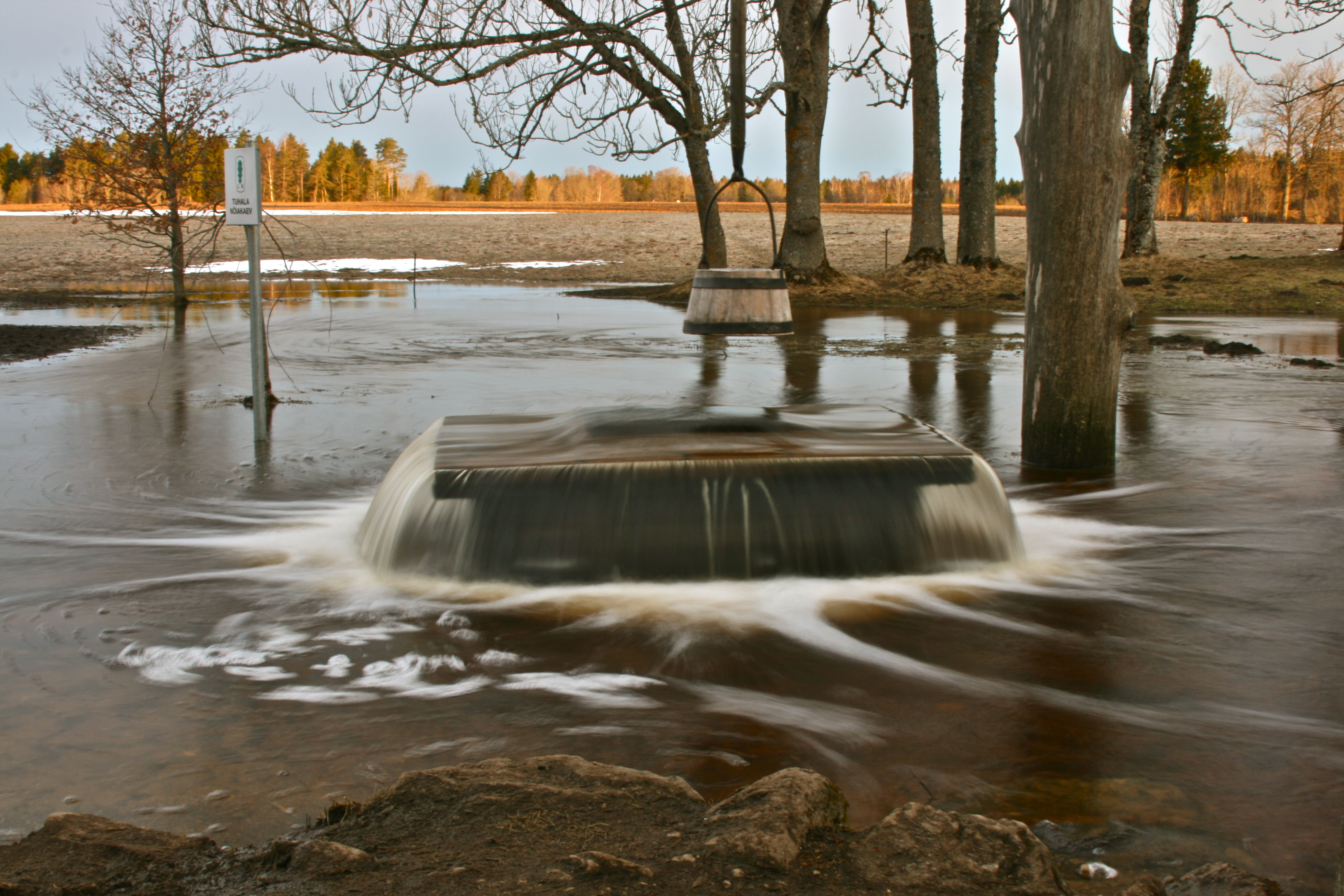 Tuhala nõiakaev, ajutine tõusuallikas Tuhala maastikukaitsealal Tuhala karstiala läbival maa-alusel jõel.